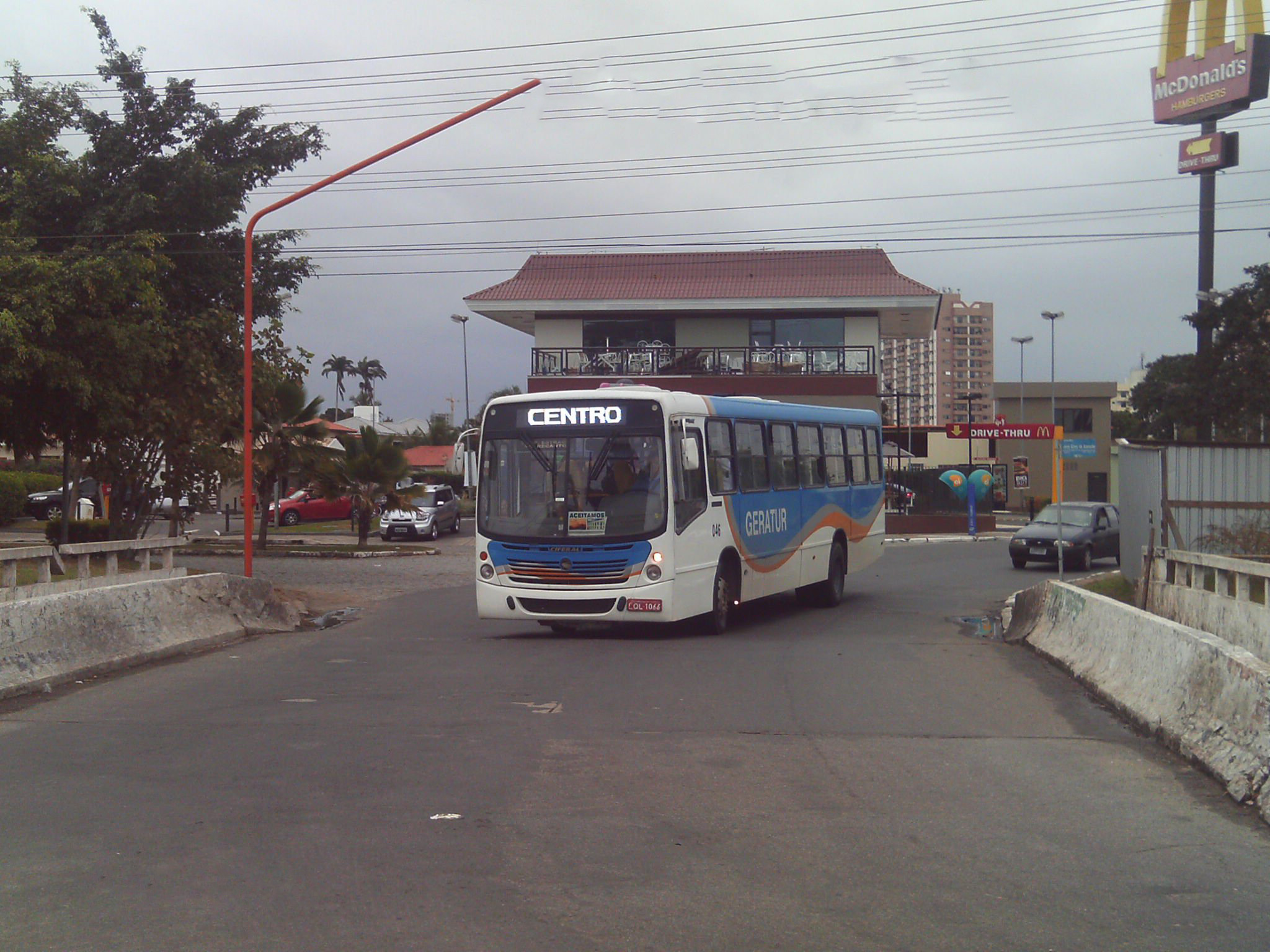 Ciferal Citmax, viação Geratur em Campos dos Goytacazes, RJ